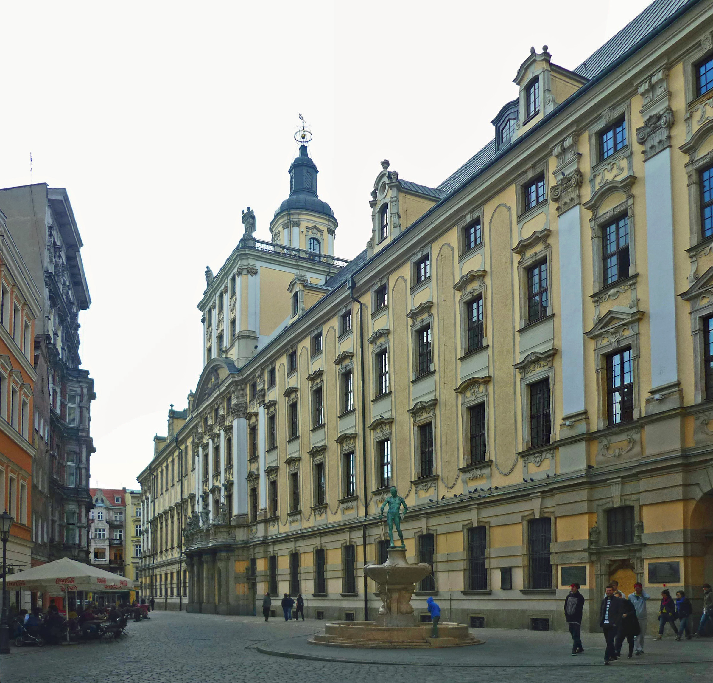 Breslauer Universität